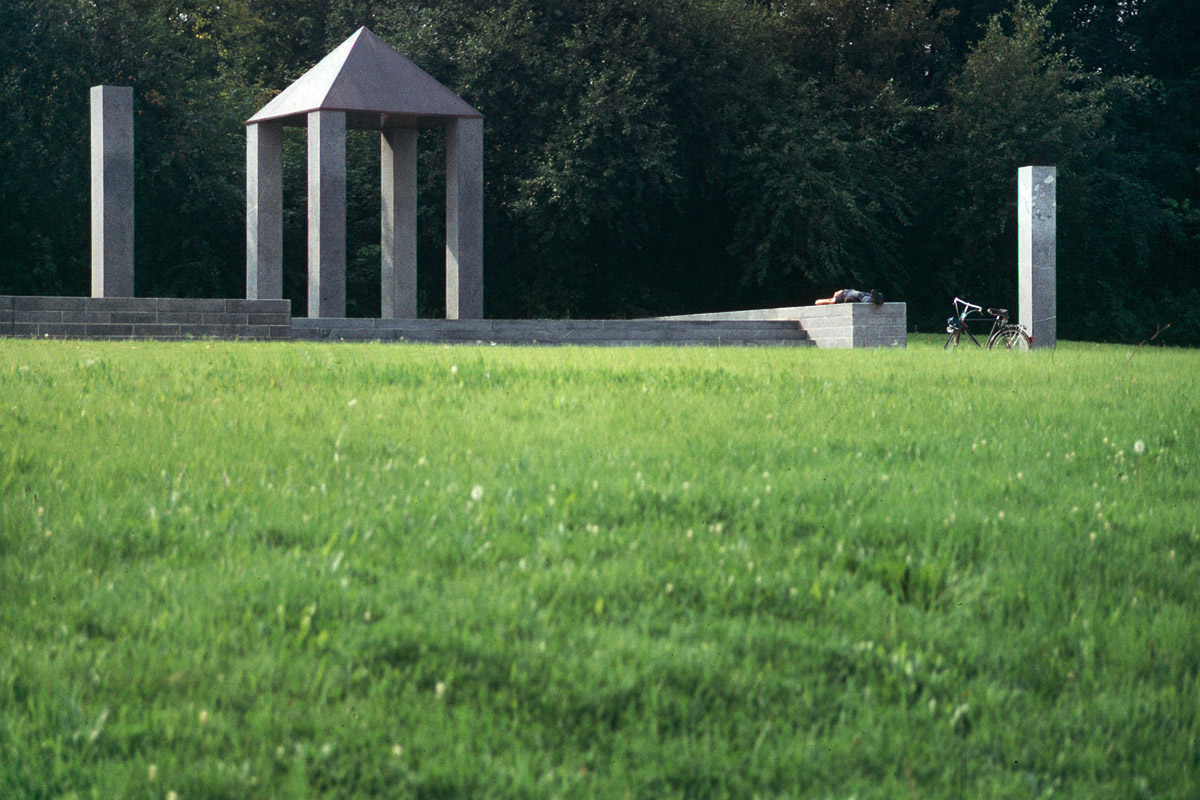 Aussichtsplatz im Niddapark 1989, als im Norden die Buga stattfand